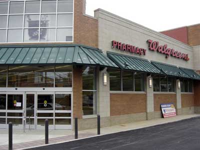 Walgreens